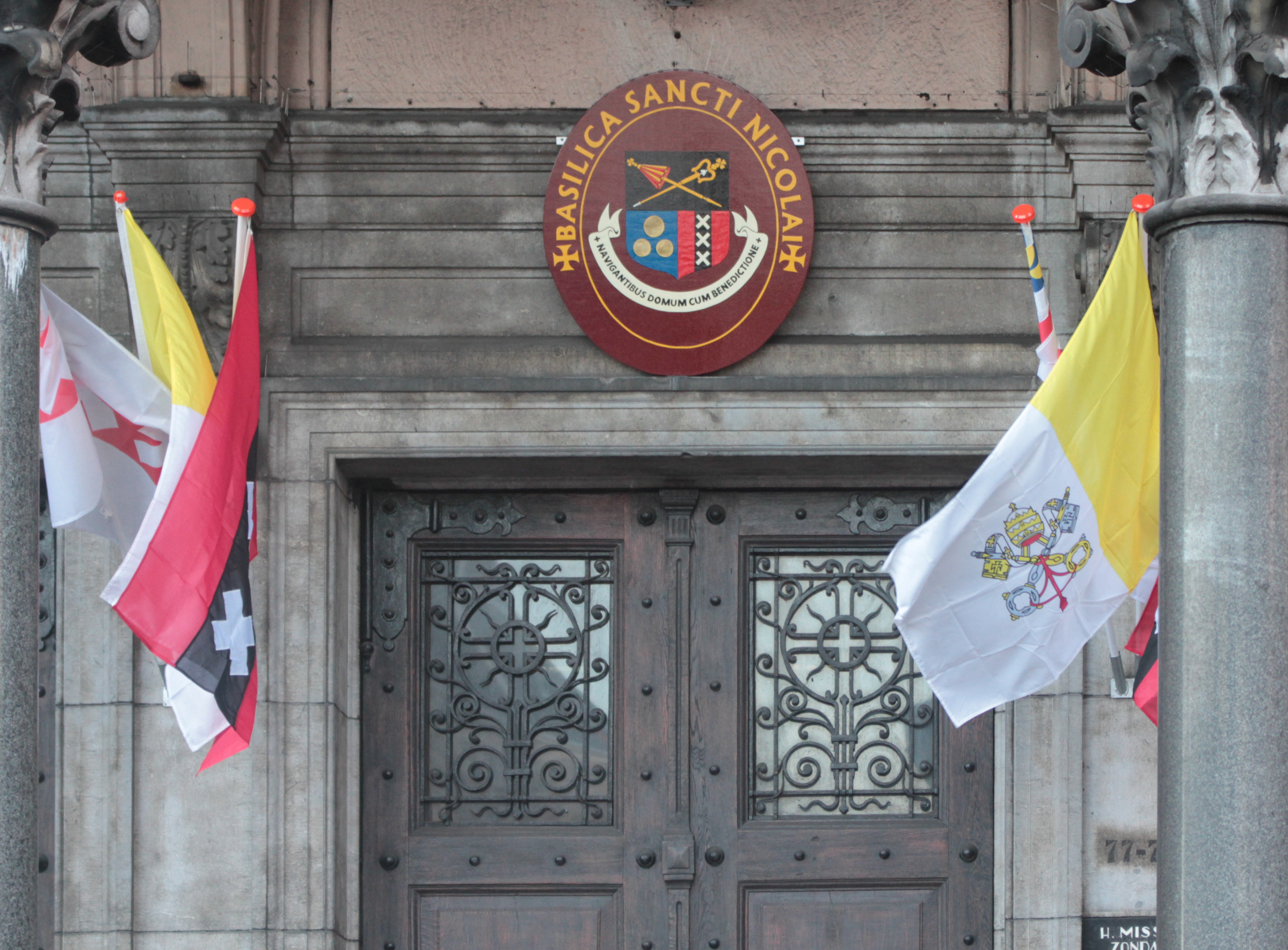 De St Nicolaaskerk mag zich basiliek noemen en heeft derhalve een nieuw bordje.